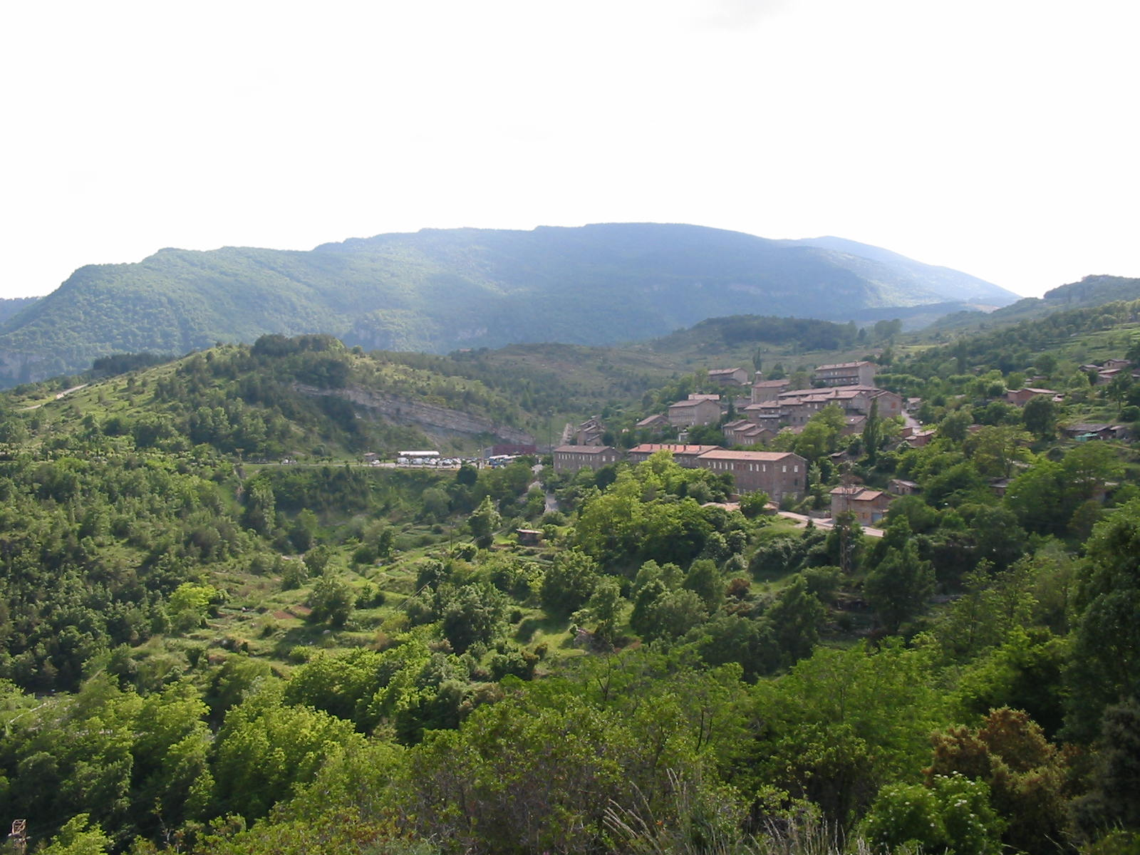 Localidad de Sant Corneli en Cercs (Barcelona, España)